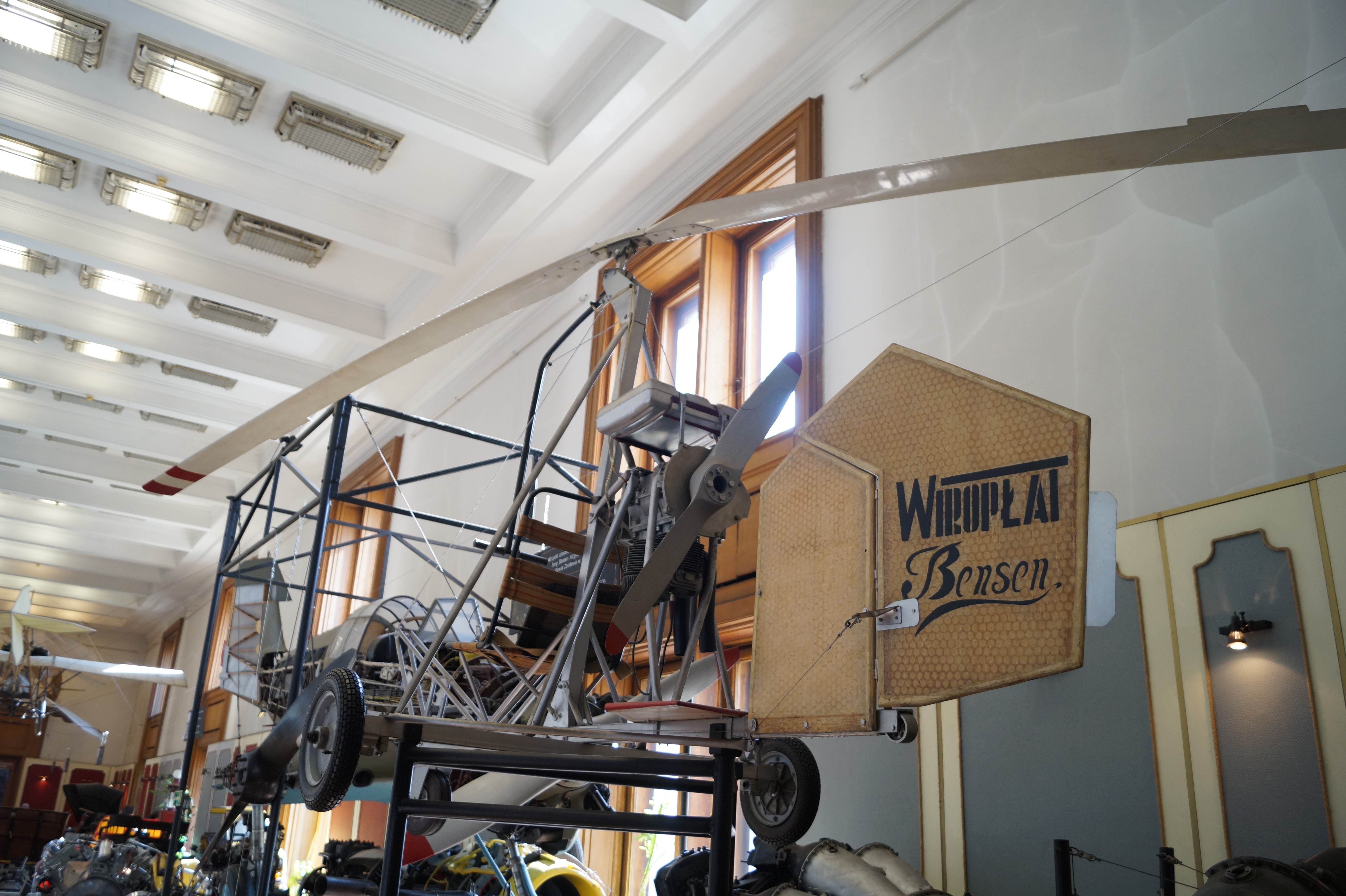 This photo was taken during Automotive Wikiexpedition 2016 set up by Wikimedia Polska Association.You can see all photographs in category Wikiekspedycja motoryzacyjna 2016. English | Polski | +/− Wiropłat Zołotow-Bensen B-8M w Muzeum Nauki i Techniki w Warszawie